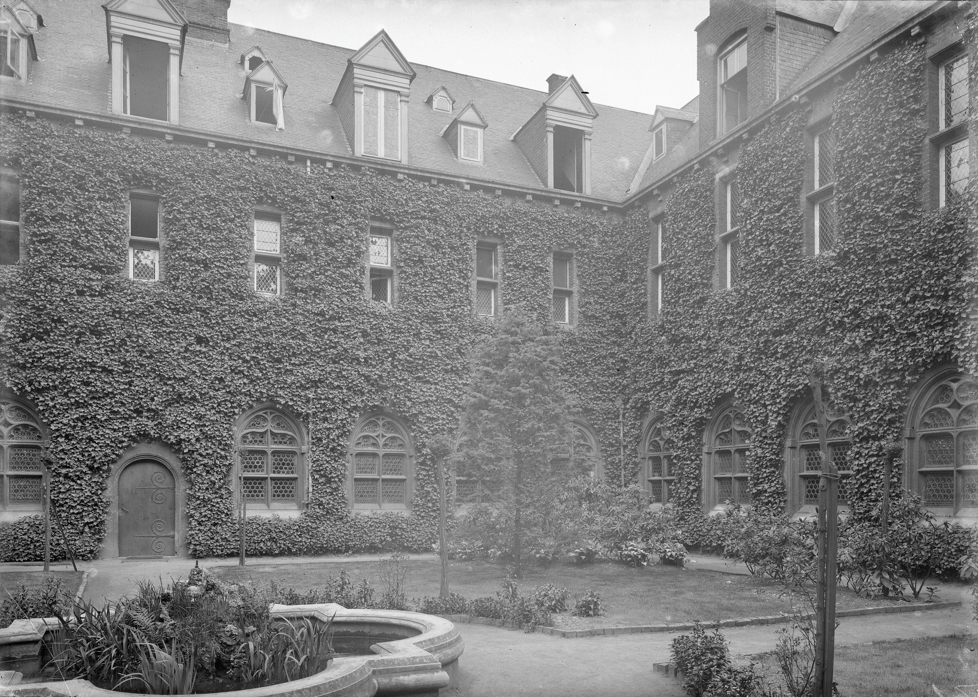 Klooster Frans Cedron: pand